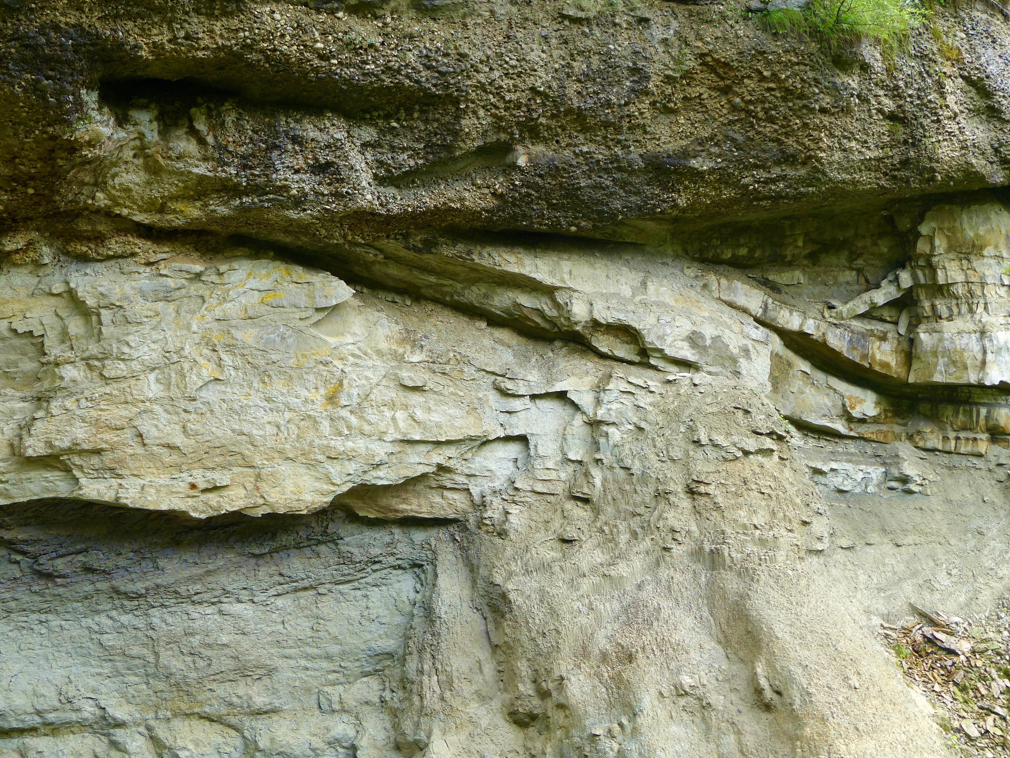 WikiProjekt Landstreicher Geotop Scheidegger Wasserfälle (Wechsellagerung von Nagelfluh - Sandstein und Mergel, mit Aufschiebung im Bereich der Sandsteinfolge